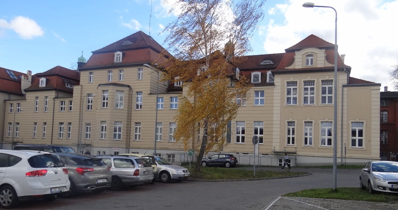 Główny budynek szpitala A przy Wojska Polskiego 27